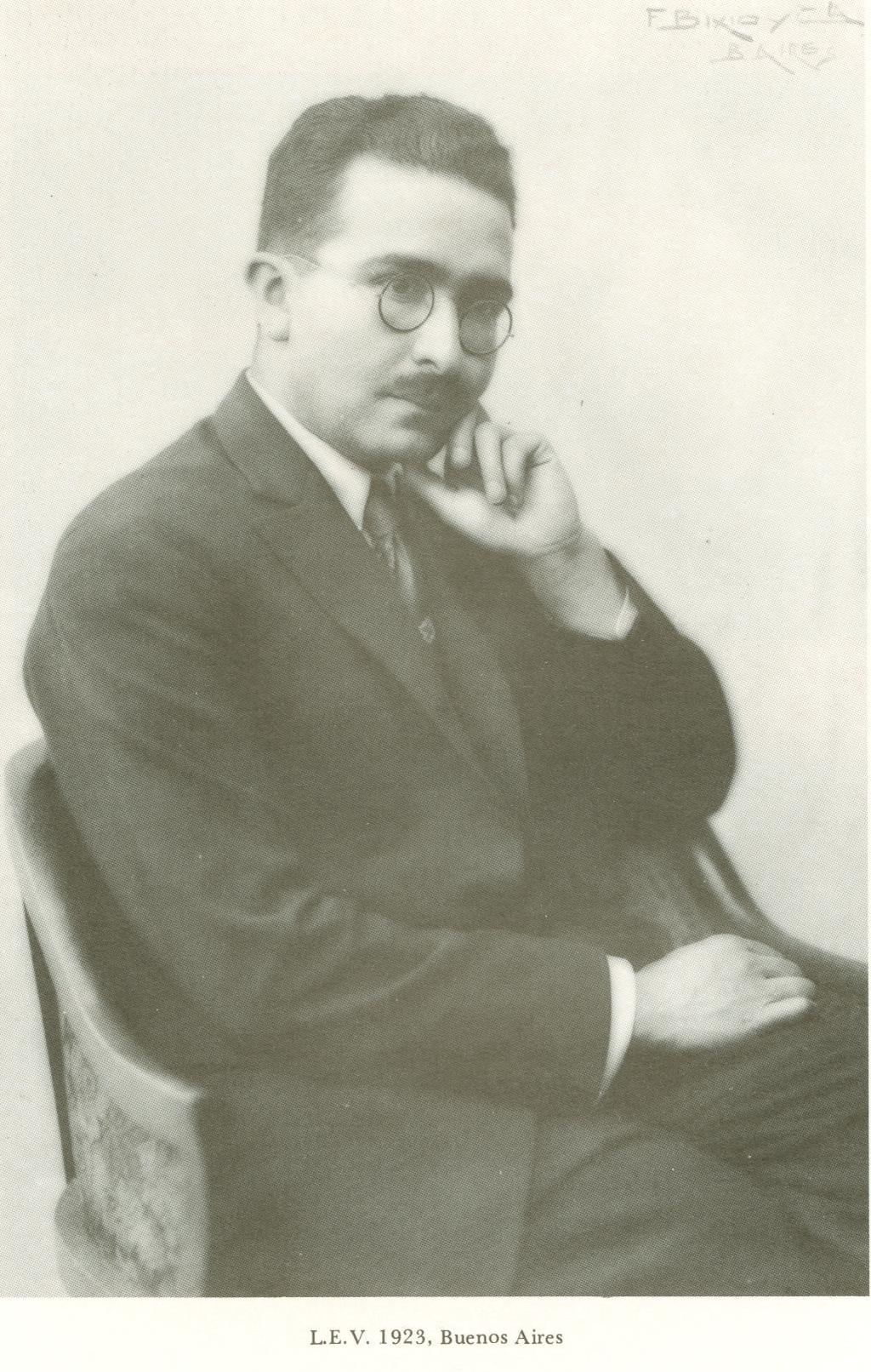 Fotografía de Luis E. Valcárcel tomada el año de 1923 en la capital de Argentina, Buenos Aires.